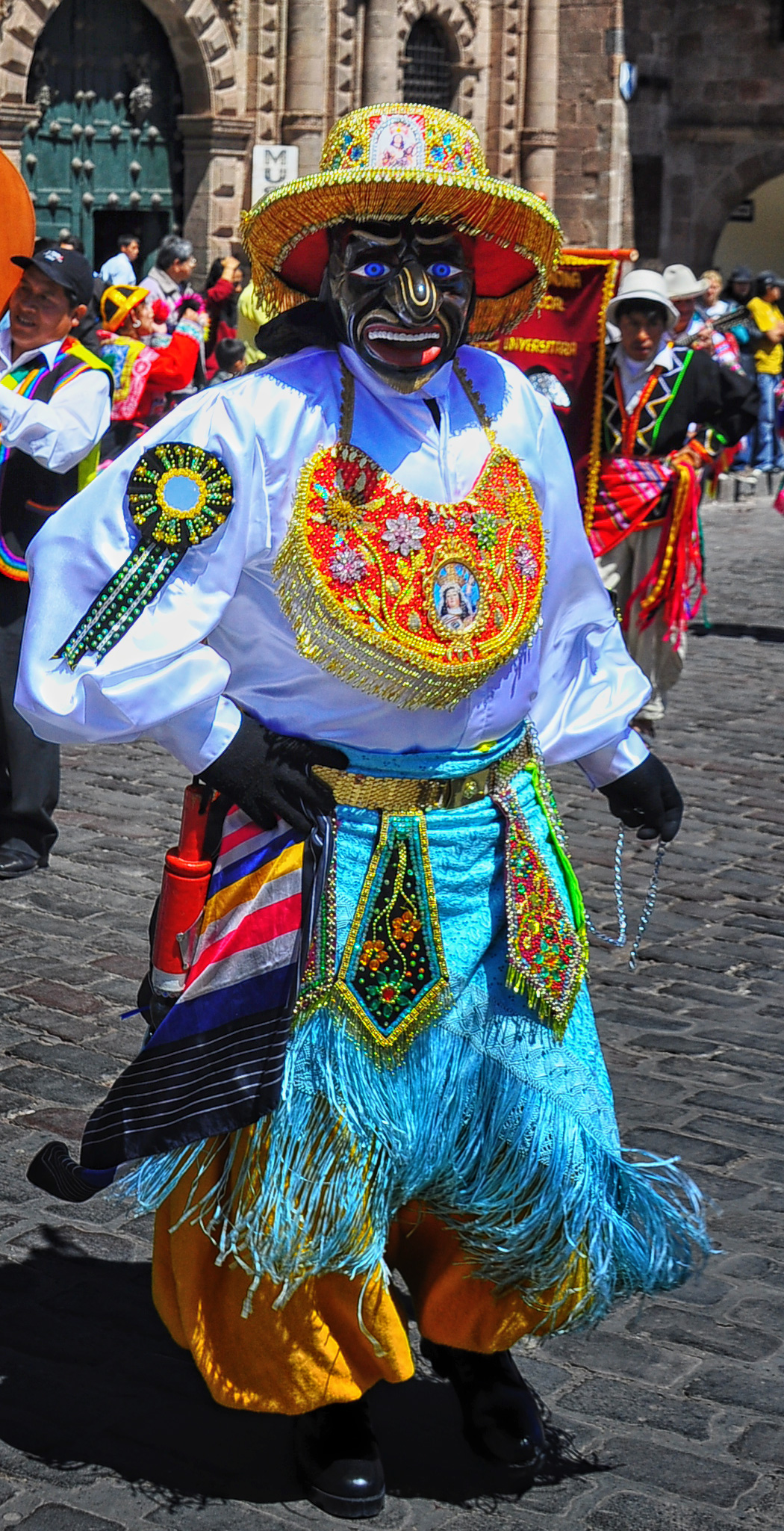 Fierce Folkloric, Cuzco